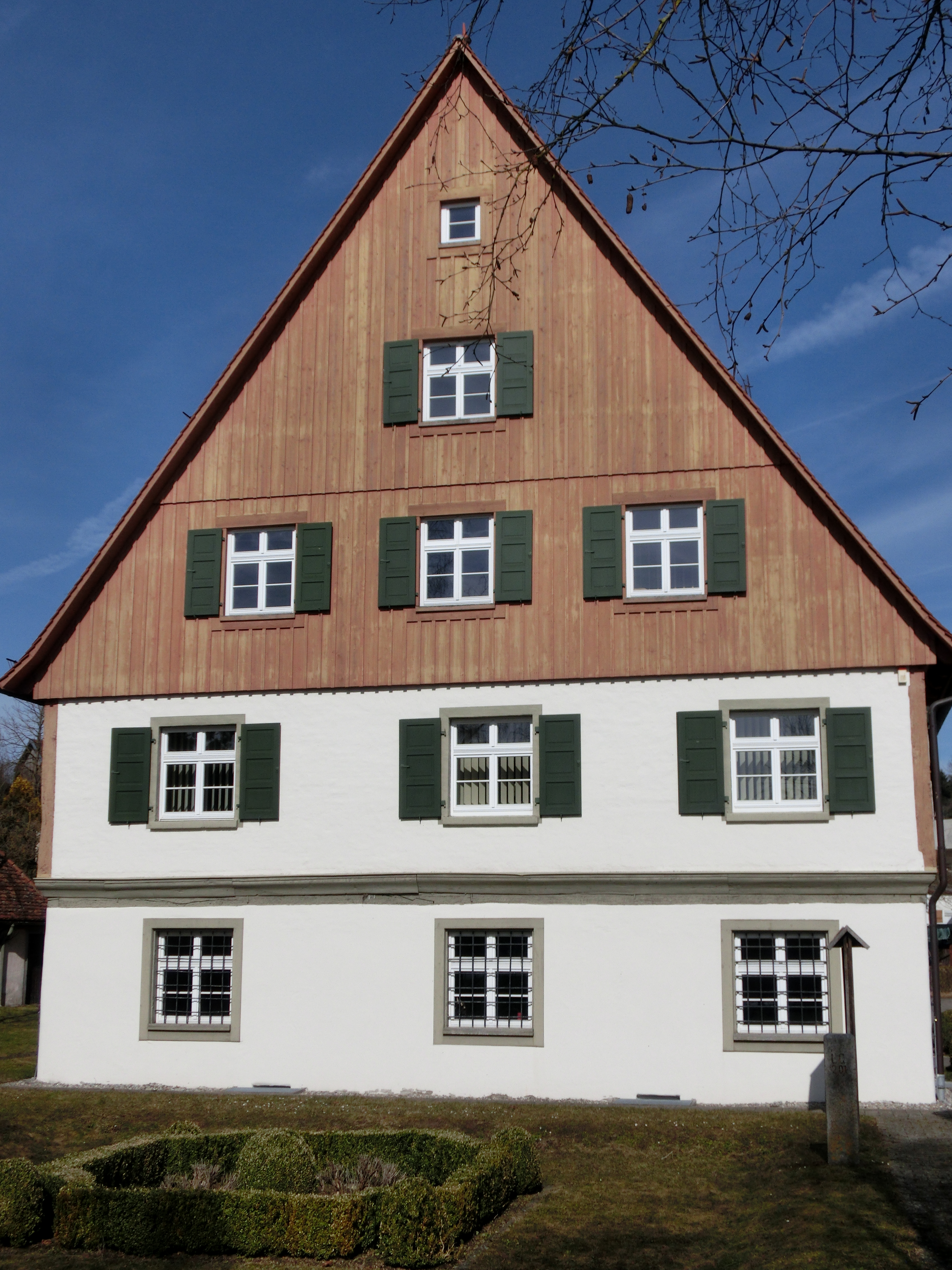 Deutschland (D) - Baden-Württemberg (BW) - Landkreis Sigmaringen (SIG) - Gemeinde Ostrach, Rentamtstraße 1: Amtshaus In dem aus dem Jahre 1700 stammenden Gebäude - es erinnert an die Herrschaft des Klosters Salems - befinden sich das Heimat- und das Grenzsteinmuseum.